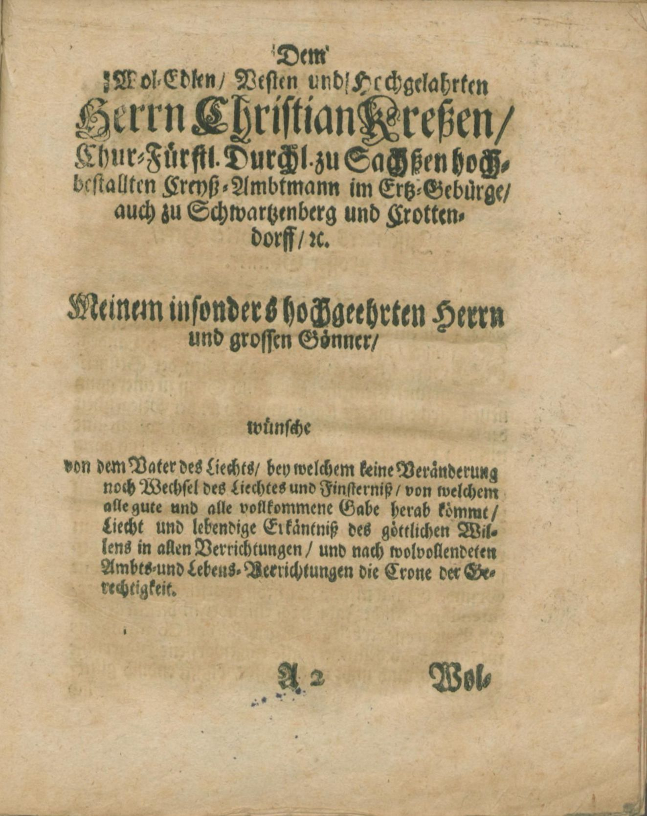 Christian Kreß (* um 1632; † 24. September 1714) war ein hoher kursächsischer Beamter. Er war Oberamtmann des Erzgebirgischen Kreises und von 1678 bis 1714 Amtmann und damit oberster Beamter der Ämter Schwarzenberg und Crottendorf. Christian Kreß nahm am 26. Januar 1697 an der Grundsteinlegung der neuen Kirche in Stützengrün teil. Die aus diesem Anlass gedruckte Festschrift wurde ihm gewidmet. Die ULB Halle hat sie als Digitalisat in ihren Beständen [1], abgerufen am 2. Juli 2014.